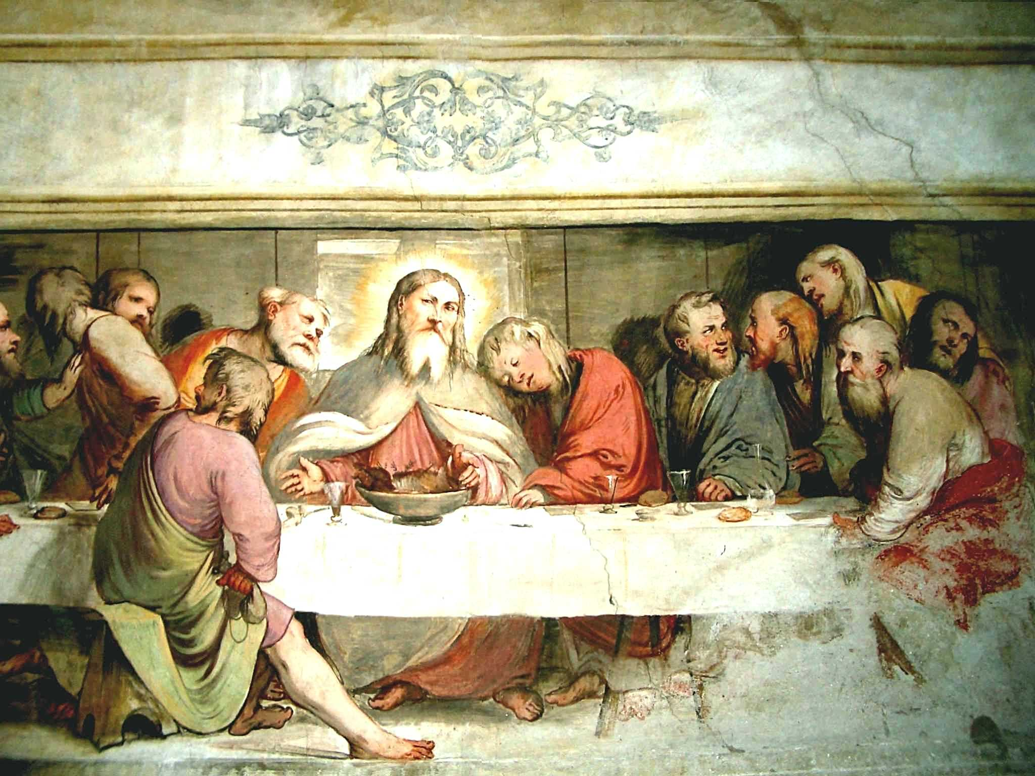 Gerolamo di Romano called Romanino, "Last Supper", 1533-34, fresco, Church of Santa Maria della Neve, Pisogne (BS), Italy